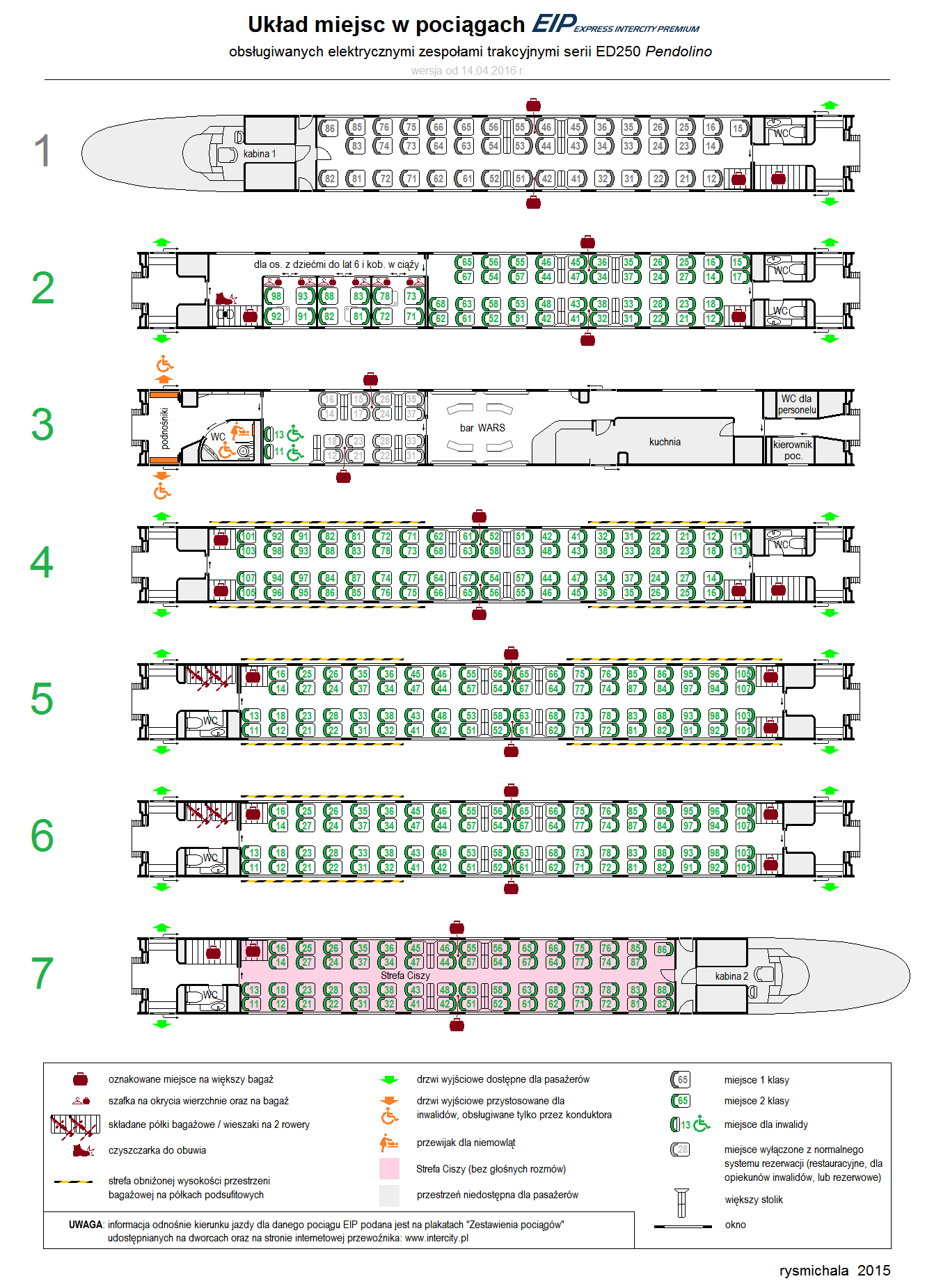 Układ miejsc w pociągach EIP obsługiwanych ezt serii ED250 Pendolino